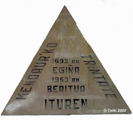 Plaque date édification et restauration de la chapelle de la Trinité à Mendaur Pyrénées).